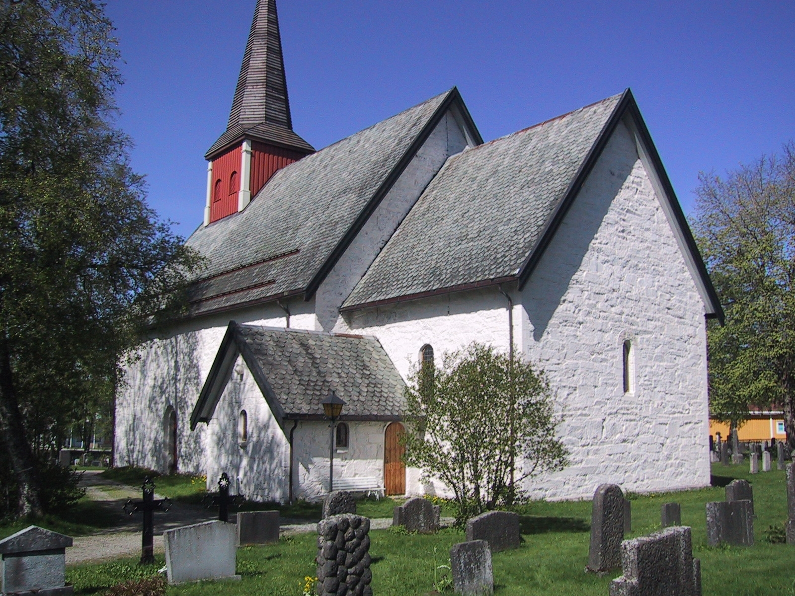 Ranem kyrkje sett frå sørvest